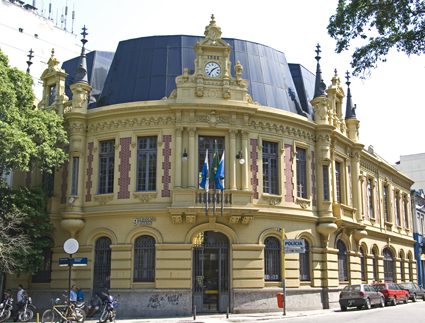 9ª Delegacia Policial do Rio, situado na Rua do Catete e Pedro Américo, Catete, Rio de Janeiro, Brasil.